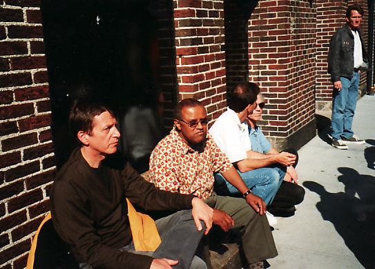 Biff Henderson